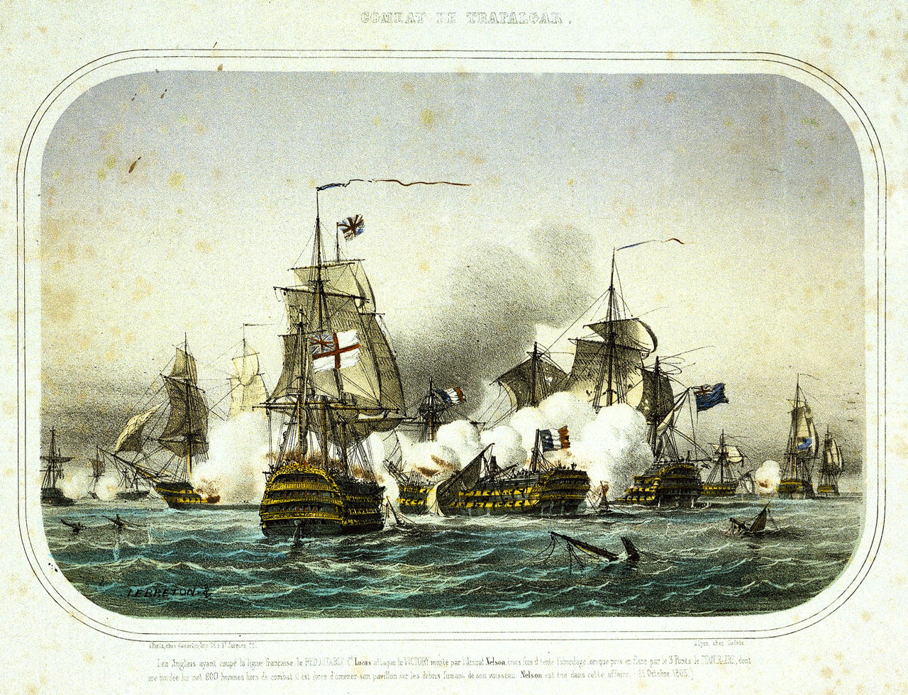 Combat de Trafalgar. Les Anglais ayant coupe la ligne Francaise, le Redoutable, Ct Lucas attaque le Victory monte par l'Amiral Nelson, trois fois il tente l'abordage, lorsque pris en flanc par le 3 Ponts le Temeraire, dont un